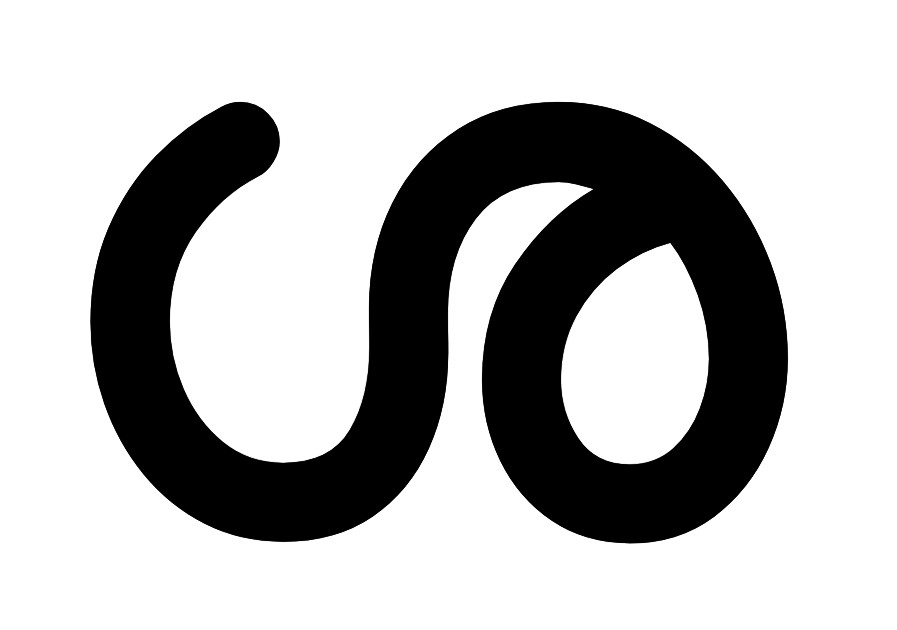 ശ മലയാളം അക്ഷരം